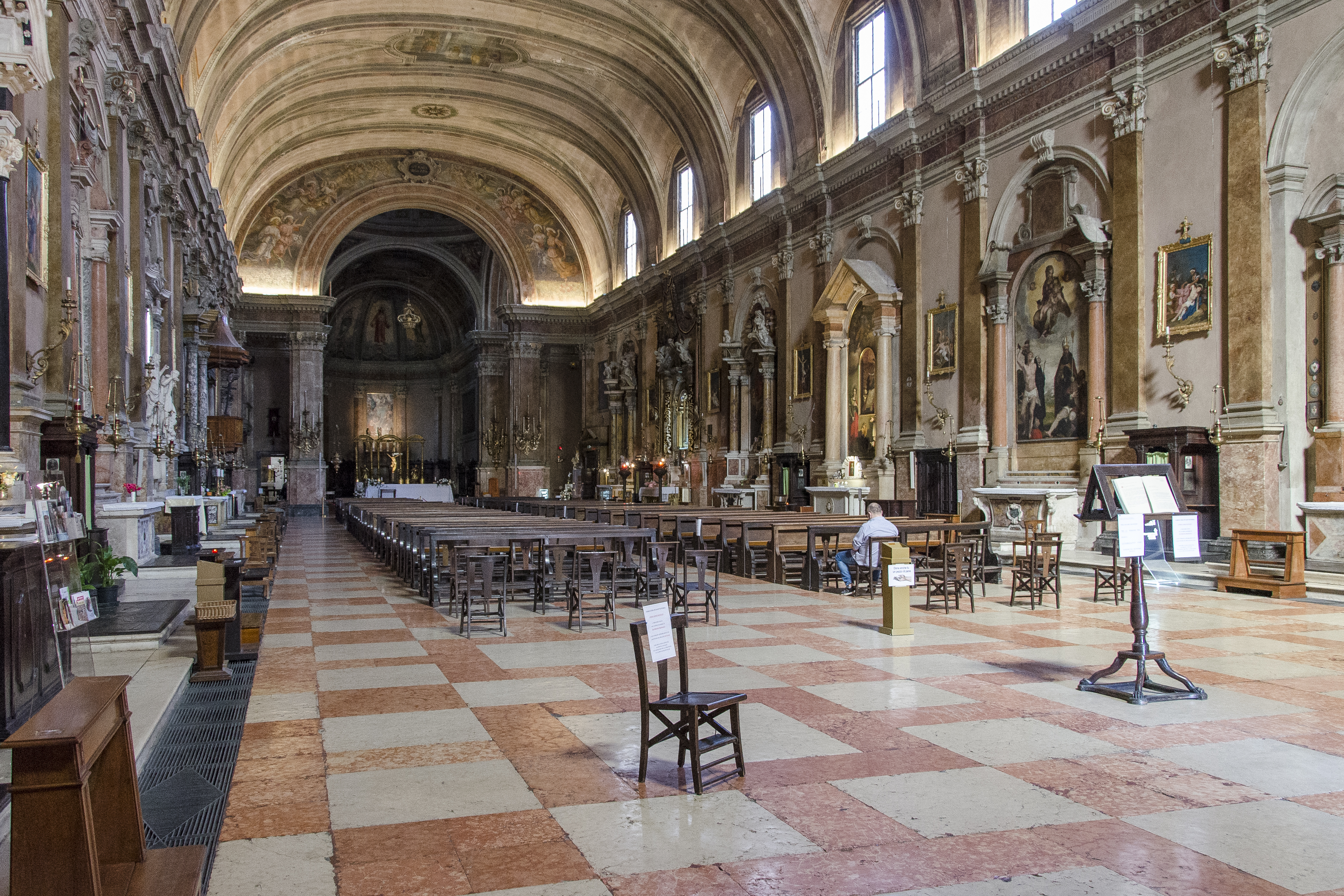 Interno della chiesa di Sant'Eufemia a Verona